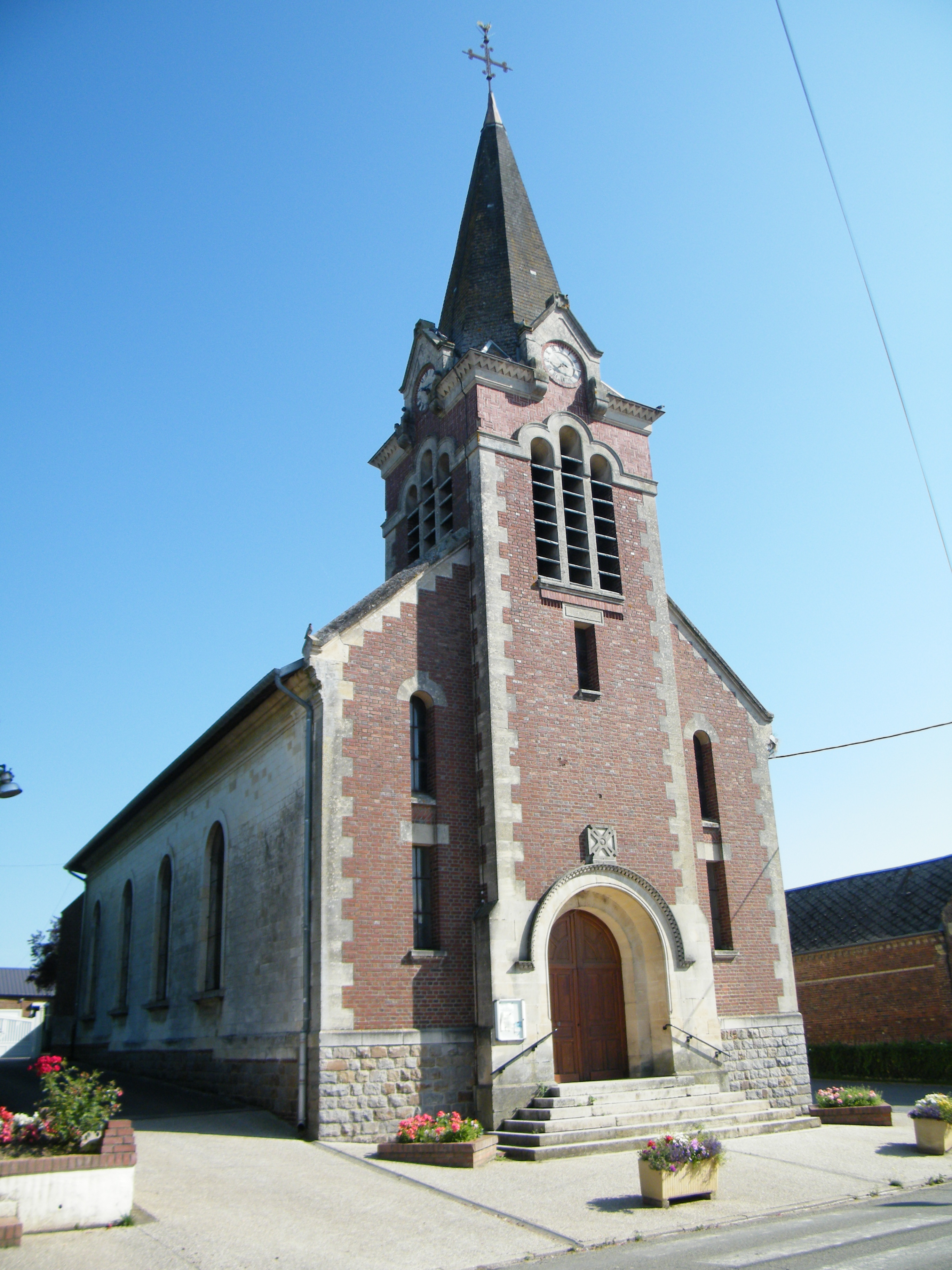 Clocher.